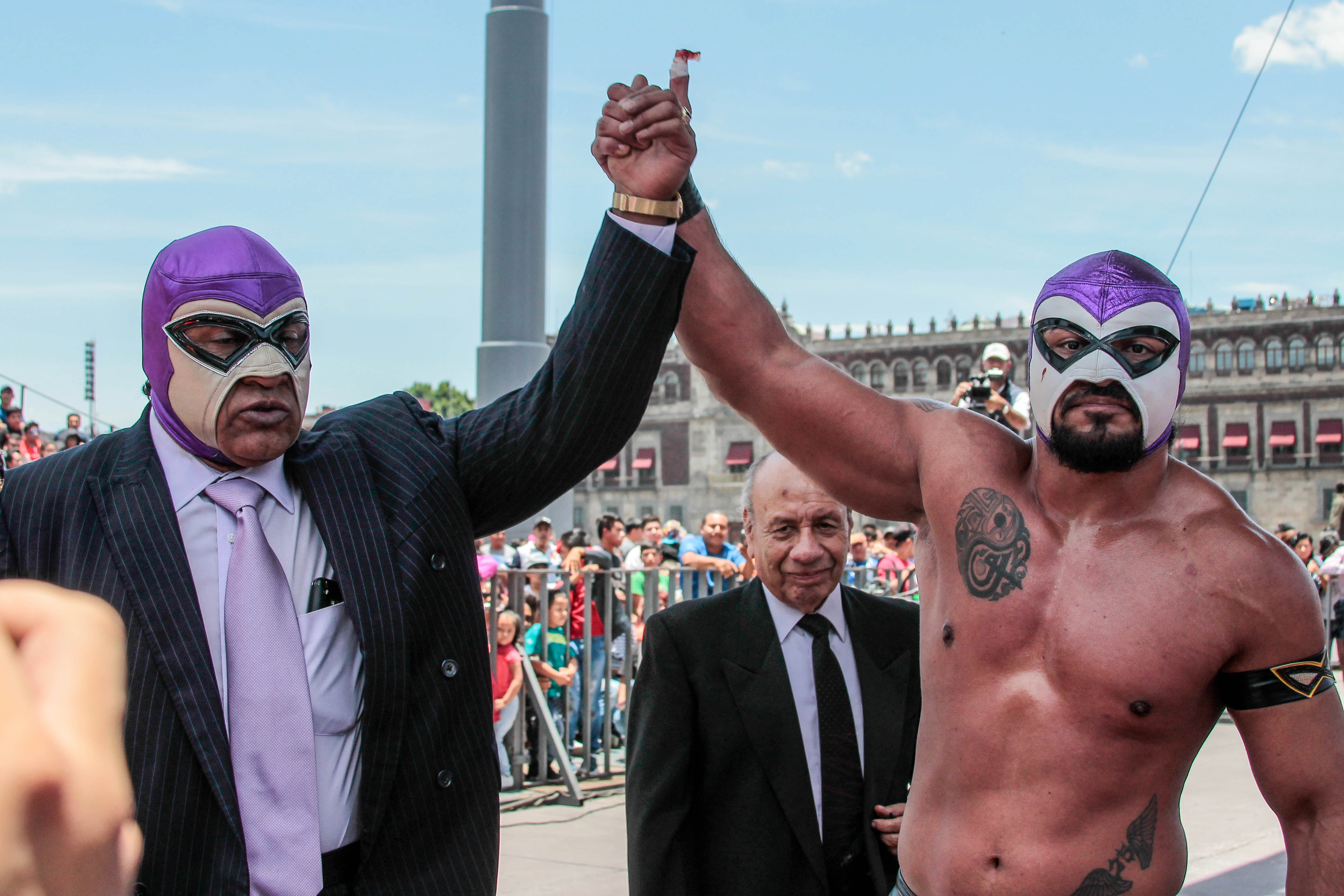 Le catcheur El Fantasma (à gauche) et son fil El Hijo del Fantasma en juillet 2018.